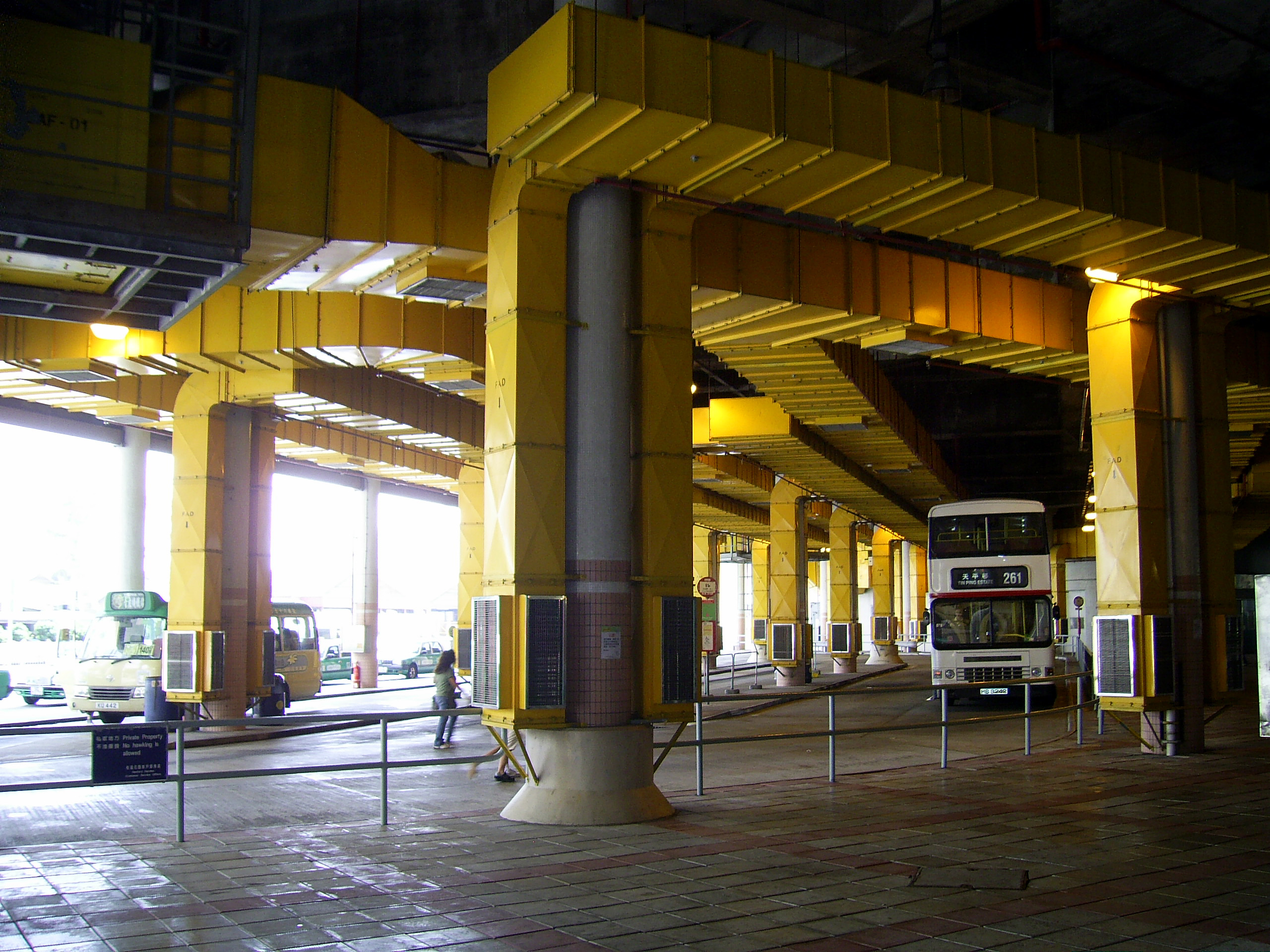 中文（香港）: 三聖公共運輸交匯處